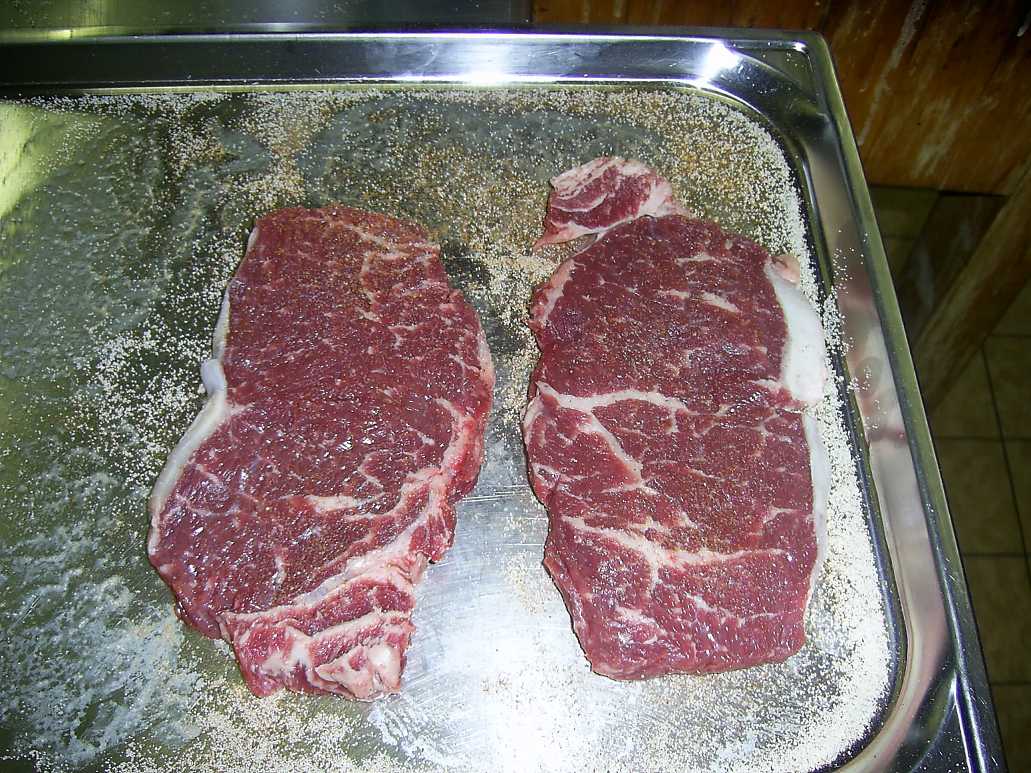 Schwäbischer Rostbraten in der Entstehung in einer Restaurantküche